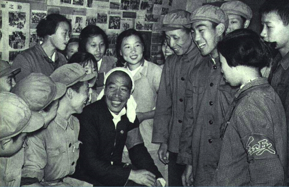 1966-11 1966年红卫兵与陈永贵